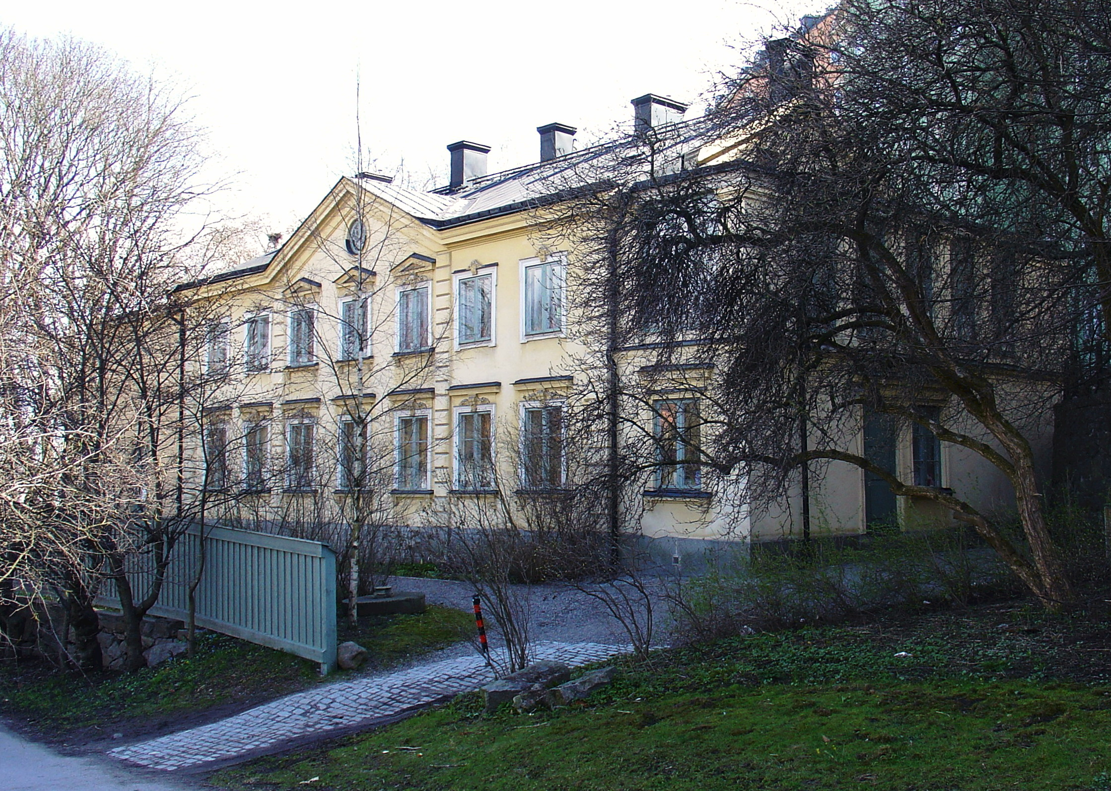 Heleneborg